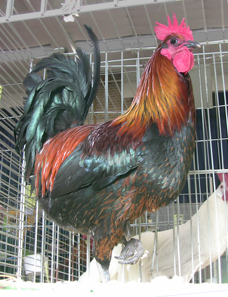 Denizli-Hahn auf einer Schau